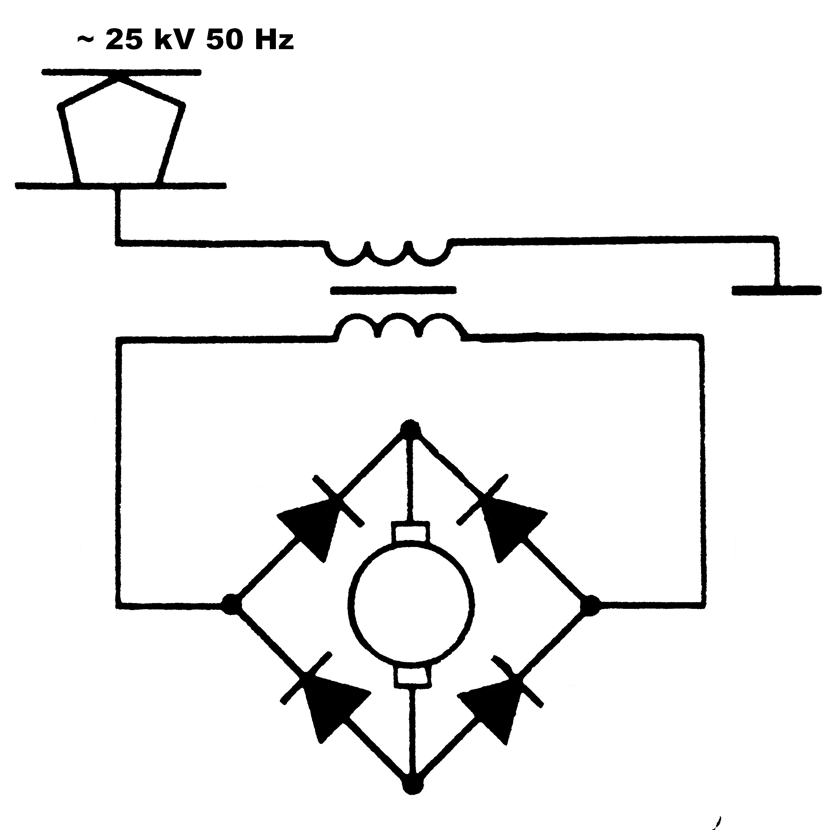 Схема электровоза переменного тока